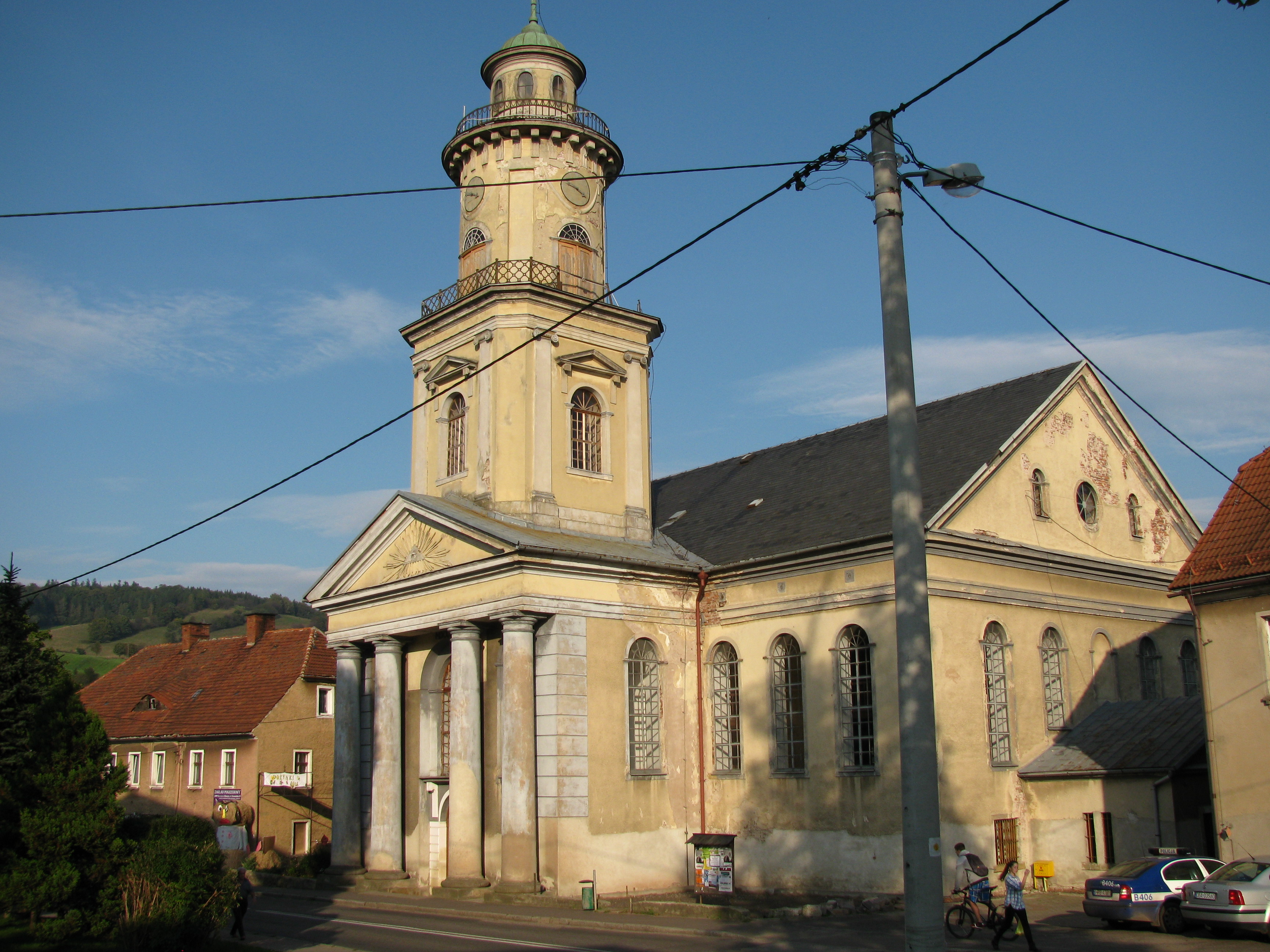 Głuszyca, ul. Grunwaldzka 83A - dawny kościół ewangelicki, obecnie rzymskokatolicki parafialny pw. Matki Boskiej Królowej Korony Polski, 1809